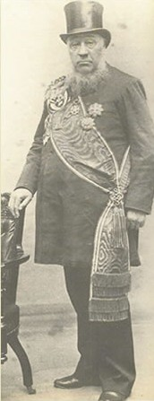 President Paul Kruger, Transvaal-Zuid Afrika